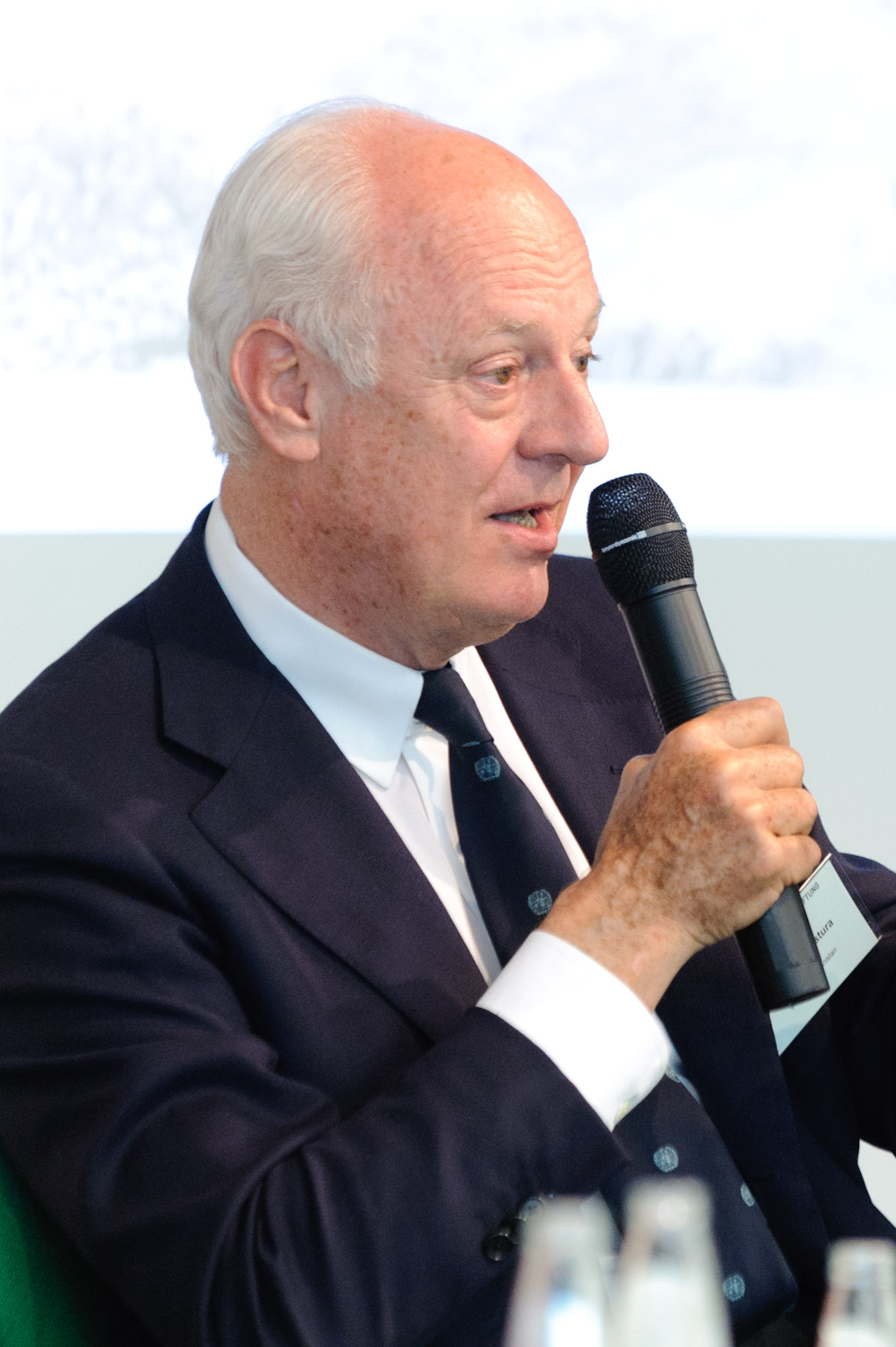 Staffan de Mistura (Sonderbeauftragter des Generalsekretärs der Vereinten Nationen für Afghanistan)